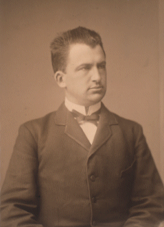 Yngvar Nielsen (1843-1916), Norwegian historian.